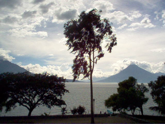 Lake Atitlán, Guatemala from Panajachel village